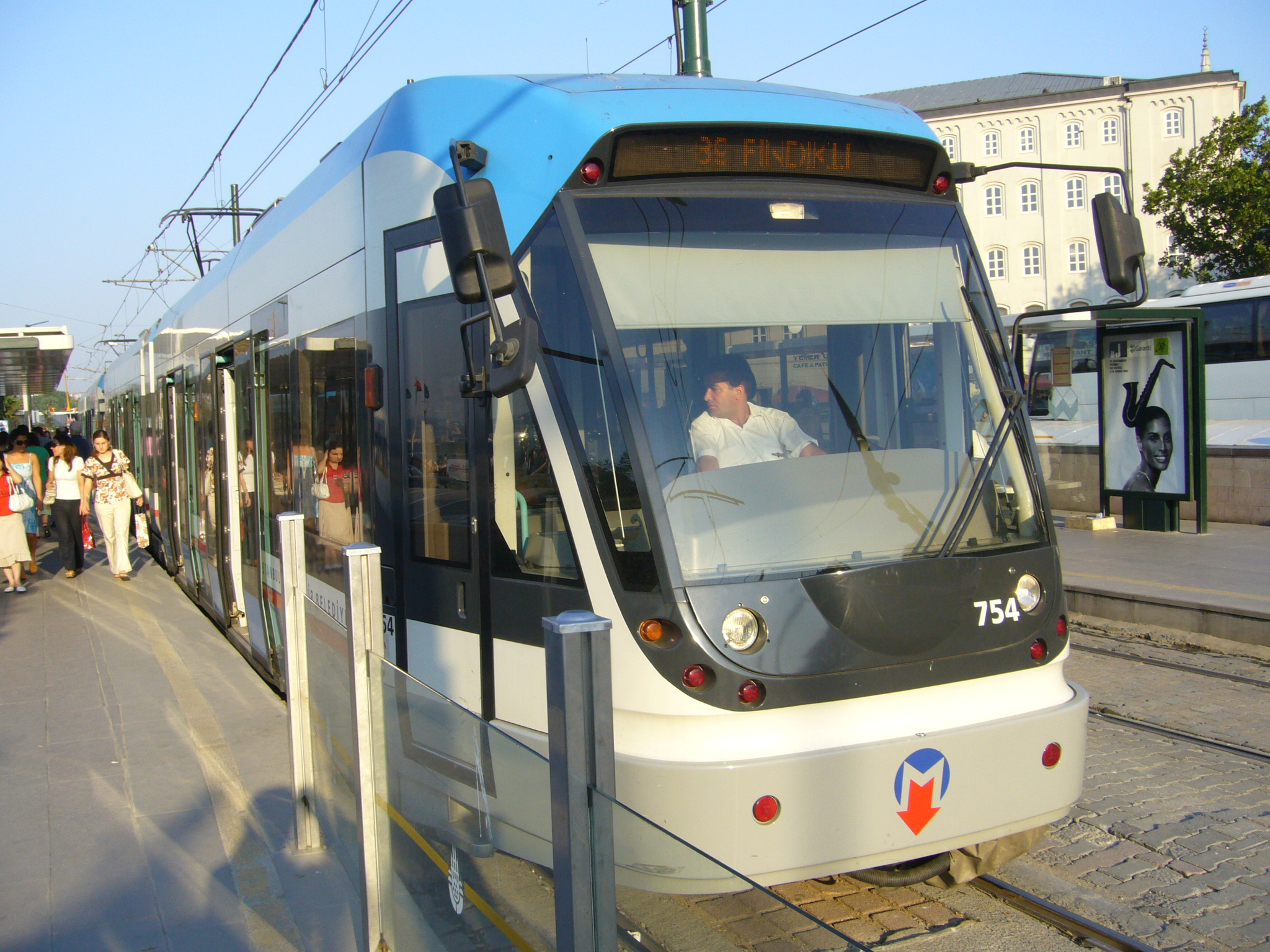 Istanbul Metro Tram